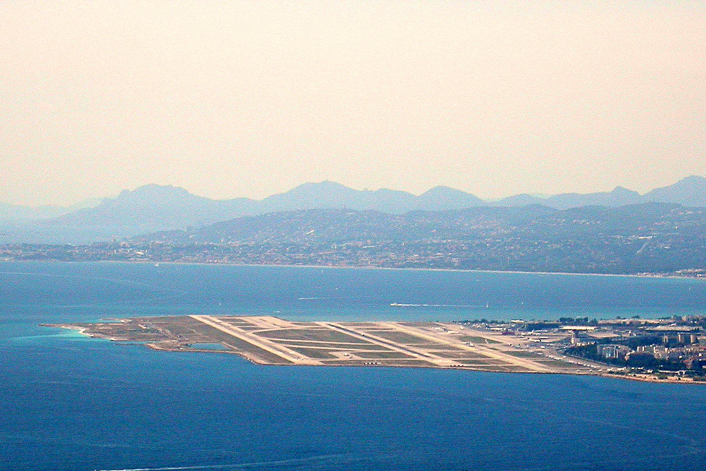 Aéroport de Nice vue des hauteurs de Villefranche-sur-Mer Nice airport from Villefranche-sur-Mer hills